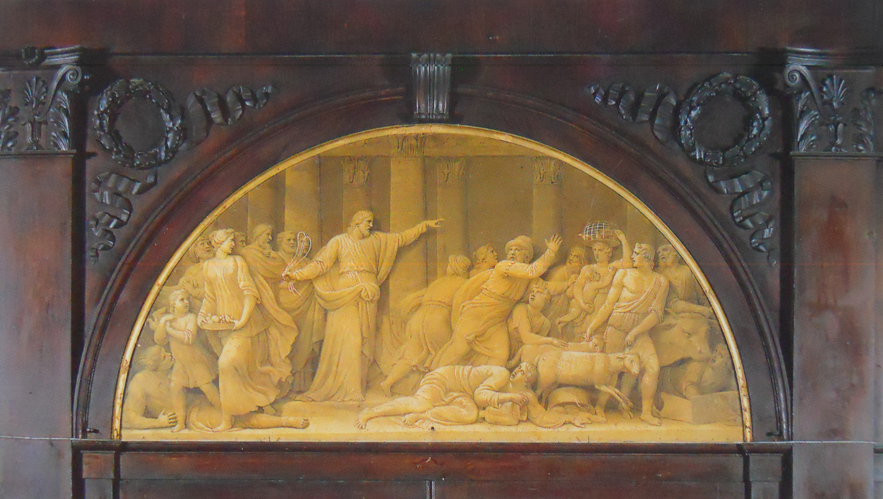 San Faustino maggiore (Brescia), la lunetta di Giuseppe Teosa